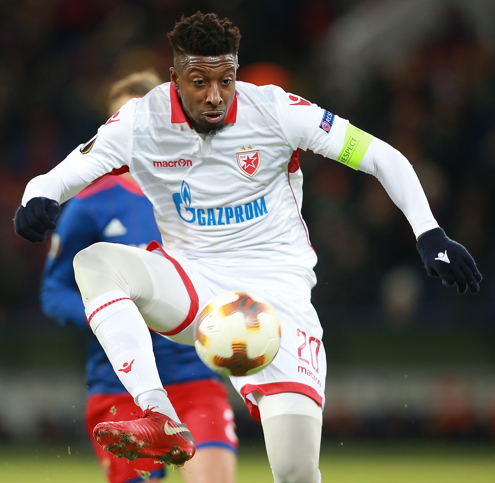 ЦСКА в Москве не без труда проходит «Црвену Звезду» в Лиге Европы